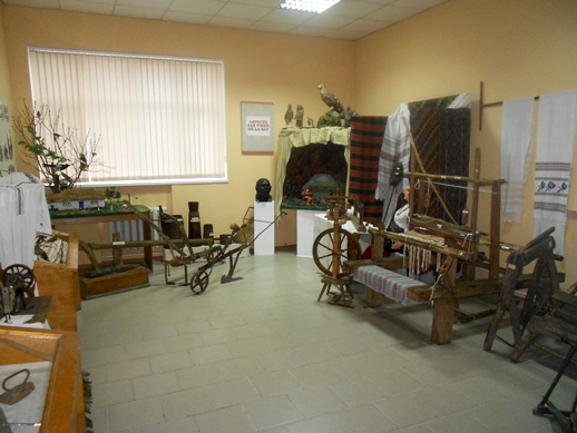 Sală expozițională în Muzeul de Istorie și Etnografie din Bălți